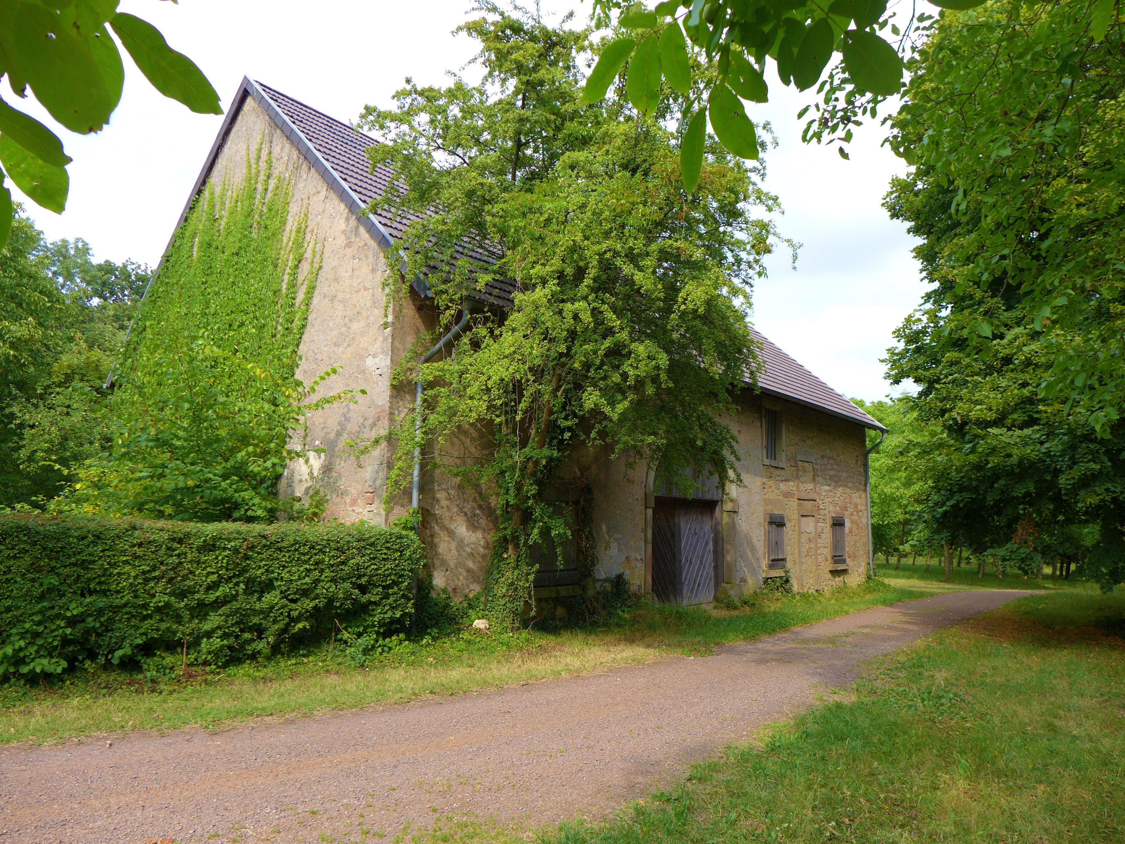 Wallerfangen, Scheune Hof Limberg